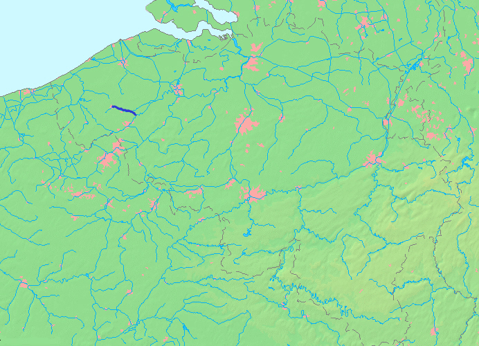 Kaart van Kanaal Roeselare-Leie op basis van Wikimedia Commons kaart MapBelgiumWater